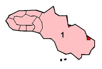 Het Savoenees tussen de andere talen van Soemba (Oost-Nusa Tenggara, Indonesië). Eigen werk, vrij voor het publiek.